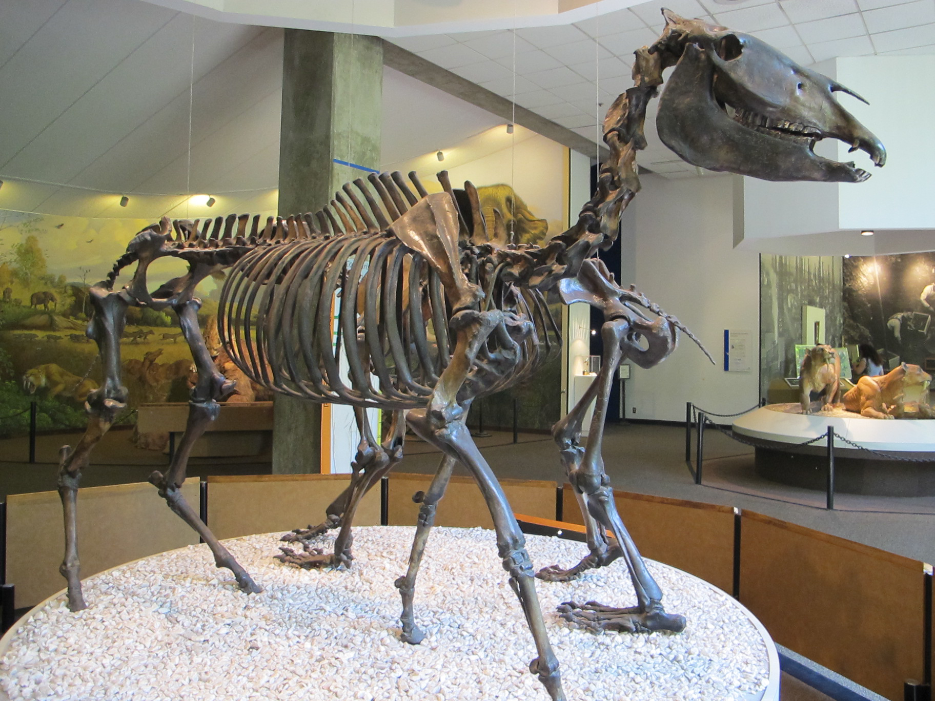 La Brea Tar Pits, Los Angeles